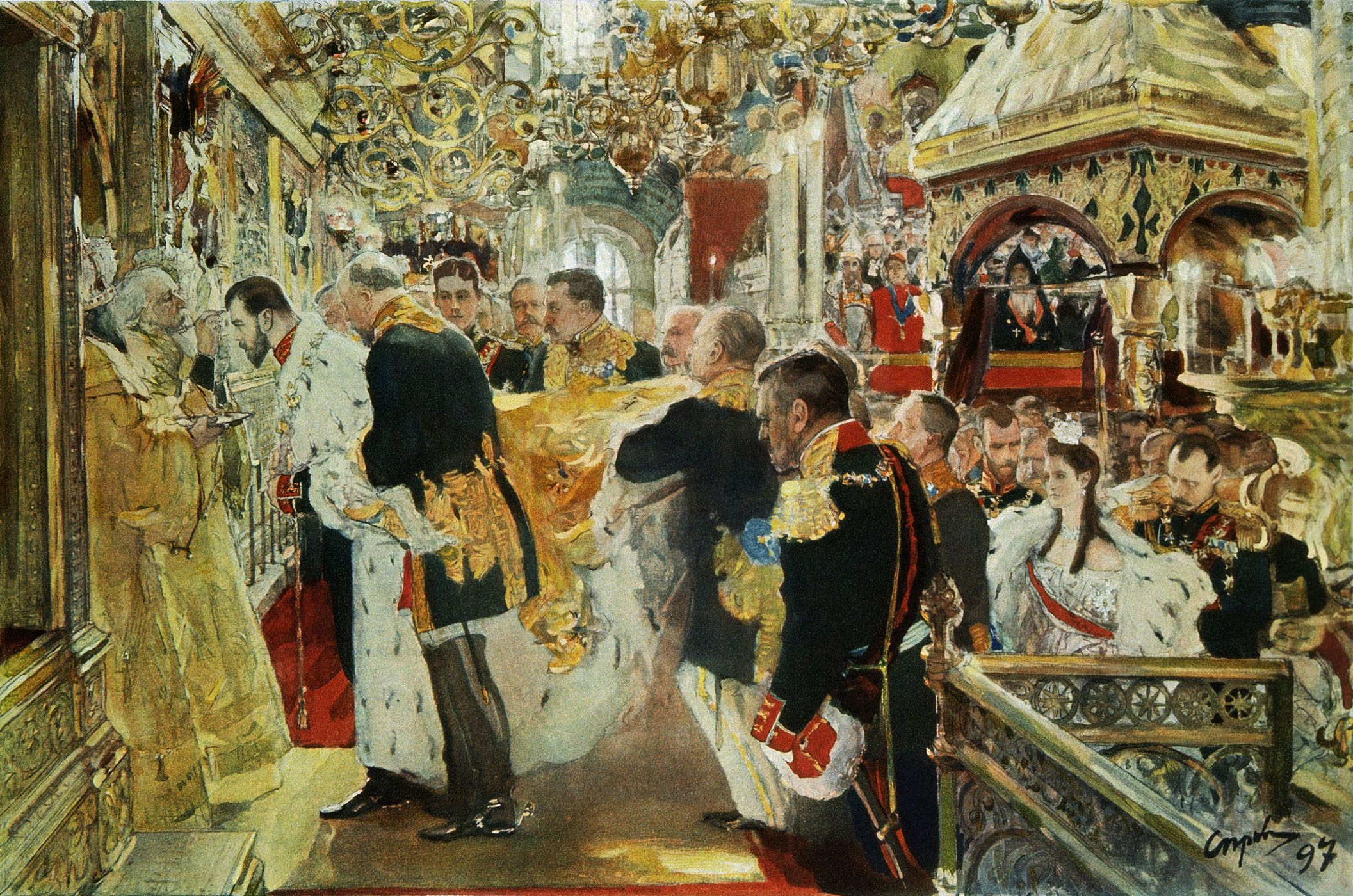 "Вдруг в одно мгновение все стихает — и музыка, и колокола, и клики народа, — и среди благоговейной тишины у южных дверей собора митрополит Московский Сергий приветствует Их Величество речью. Предшествуемые тремя митрополитами, архиереями и духовенством, при пении величественного псалма входят Их Величества в собор, где около 10 часов начинается тот торжественный чин венчания и помазания на царство, в который Православная Церковь влагает столько глубокого смысла, исполненный такого важного значения для каждого русского, понимающего свою историю."